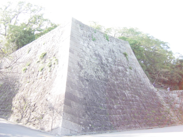 和歌山城松の丸